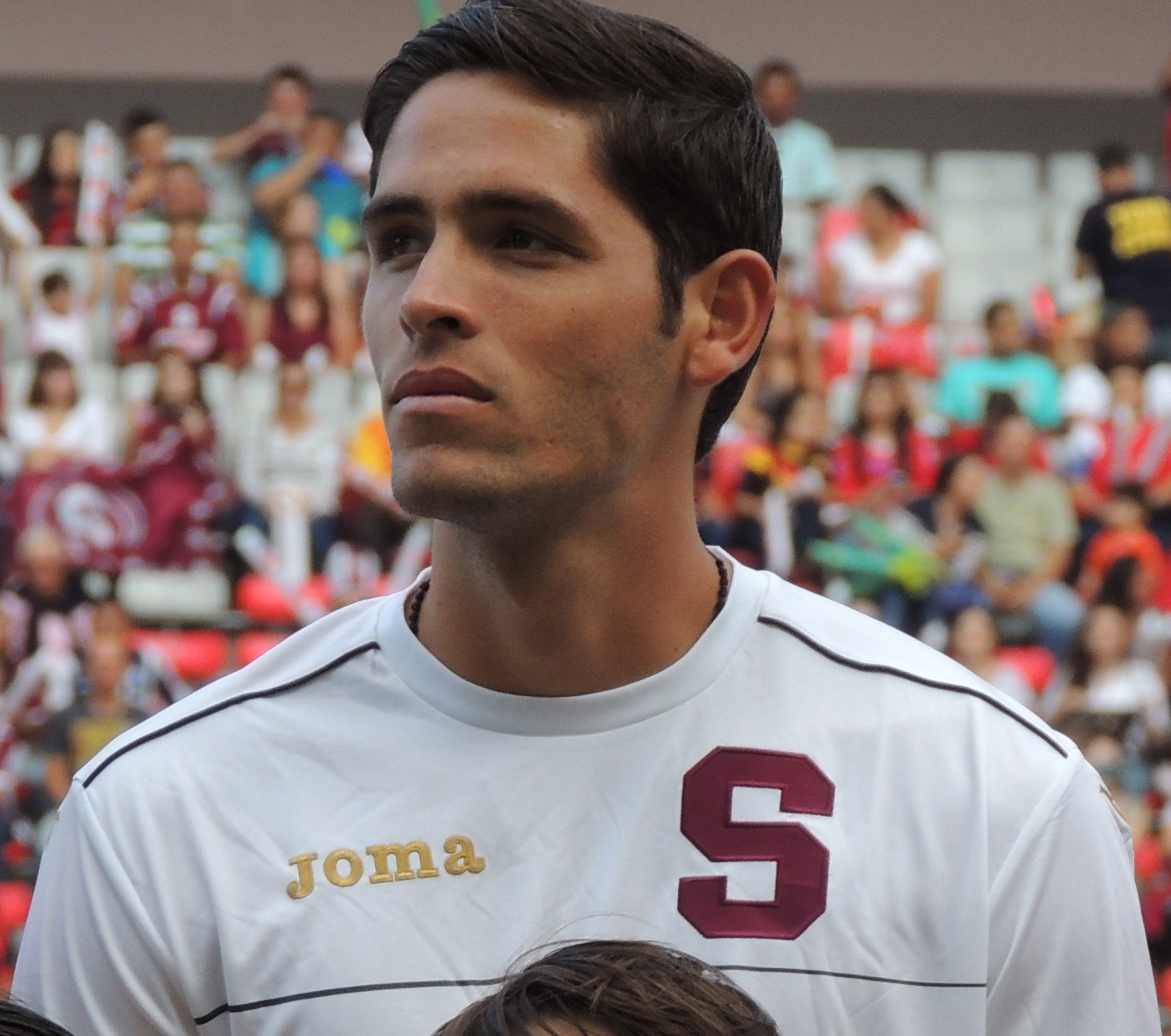 Esta obra de Luis Manuel Madrigal está bajo una licencia de Creative Commons Reconocimiento-CompartirIgual 4.0 Internacional. Para una versión sin logo escriba a